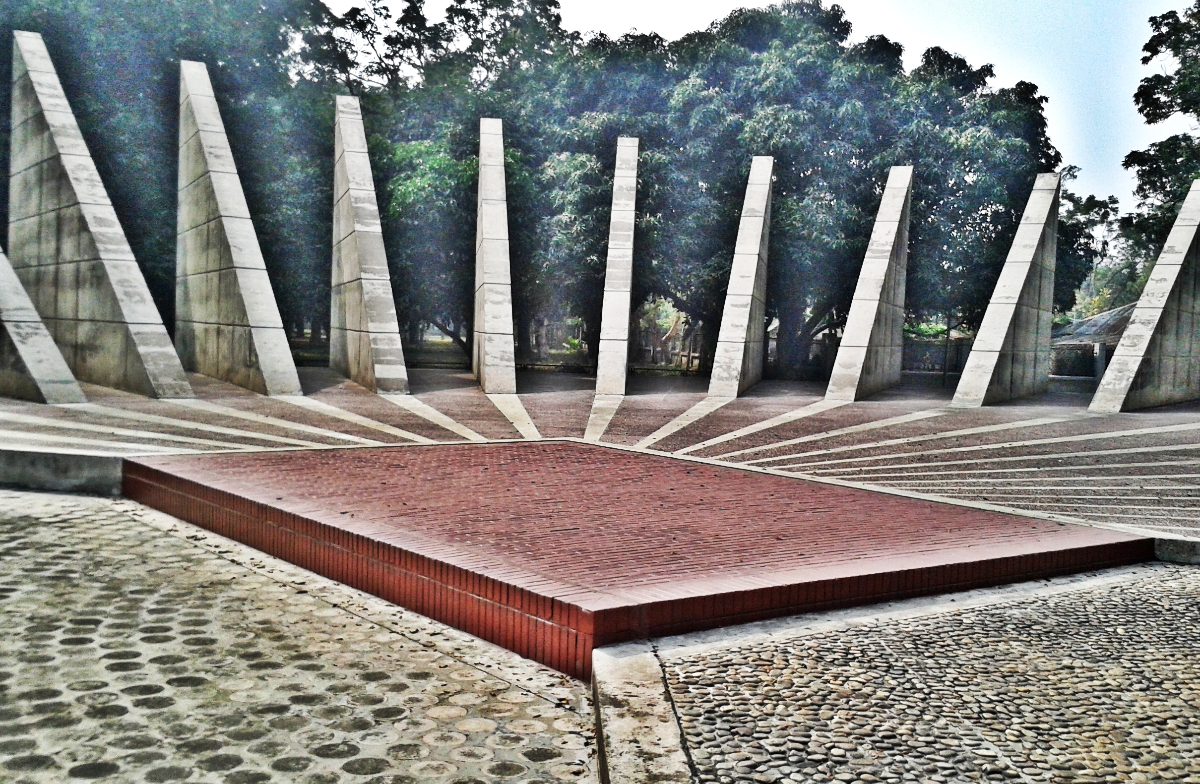 লাল মঞ্চ